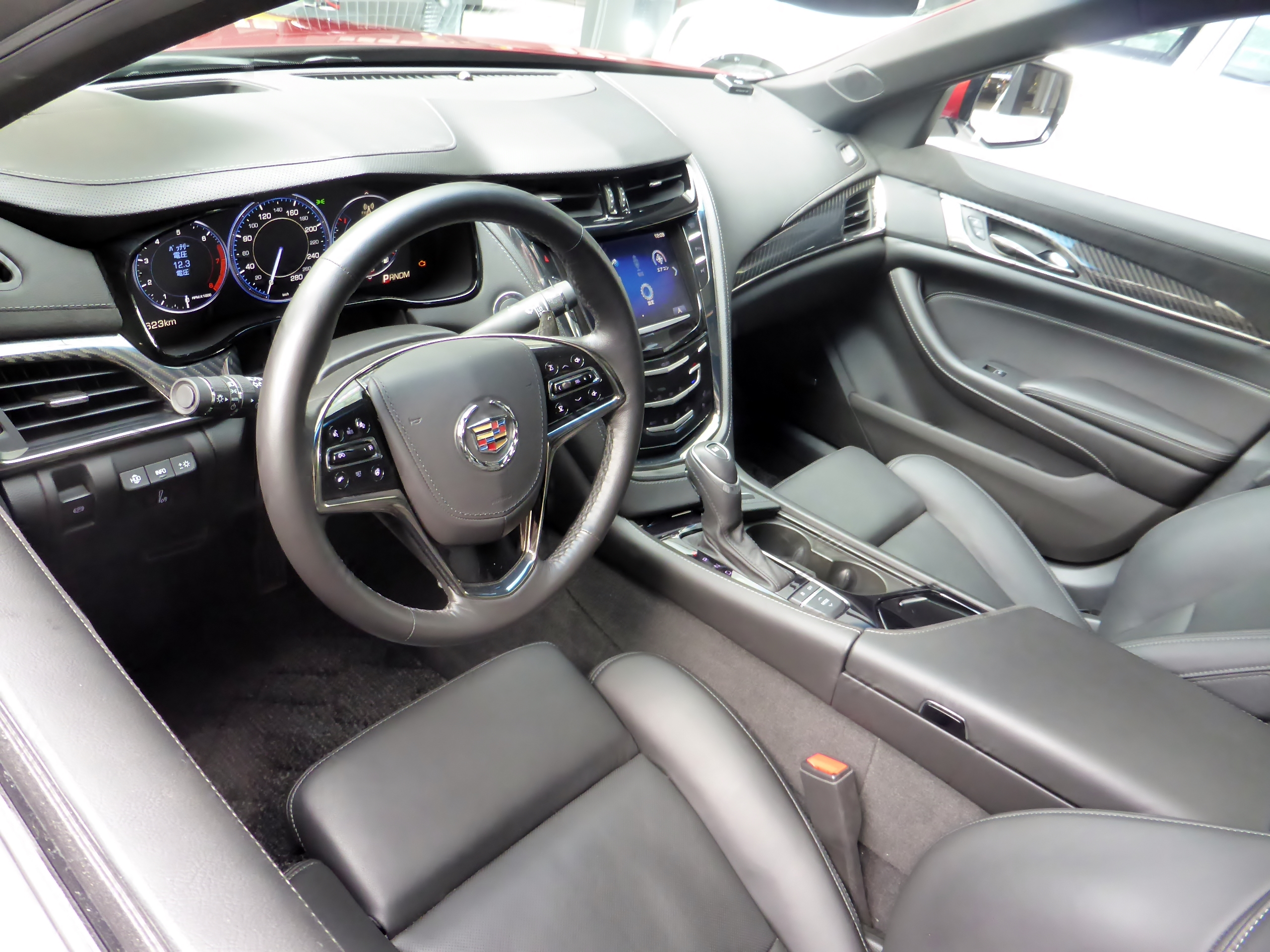 ABA-A1LL型キャデラック・CTS Eleganceのインテリアを撮影。